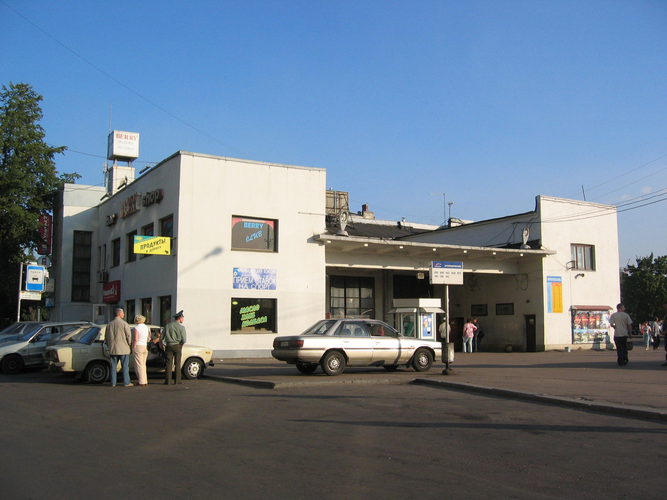 Viipurin linja-autoasema